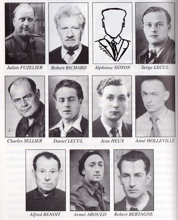 Groep verzetsstrijders die de bevrijding organiseerde in de gevangenis van Abbeville op 22 juni 1944